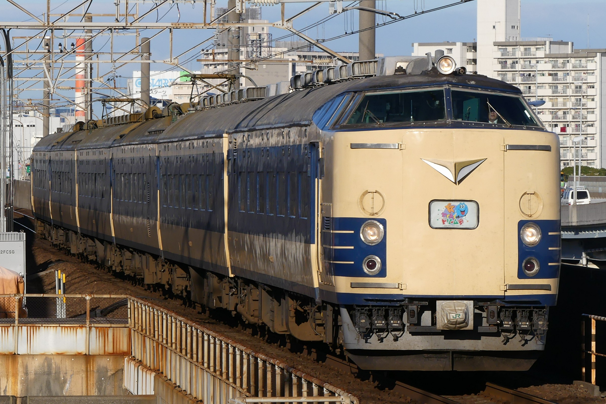 583系電車(わくわくドリーム号)